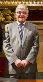 La Cambra de Comerç de Barcelona i el Consejo General del Poder Judicial (CGPJ).